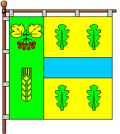 Прапор села Малехів